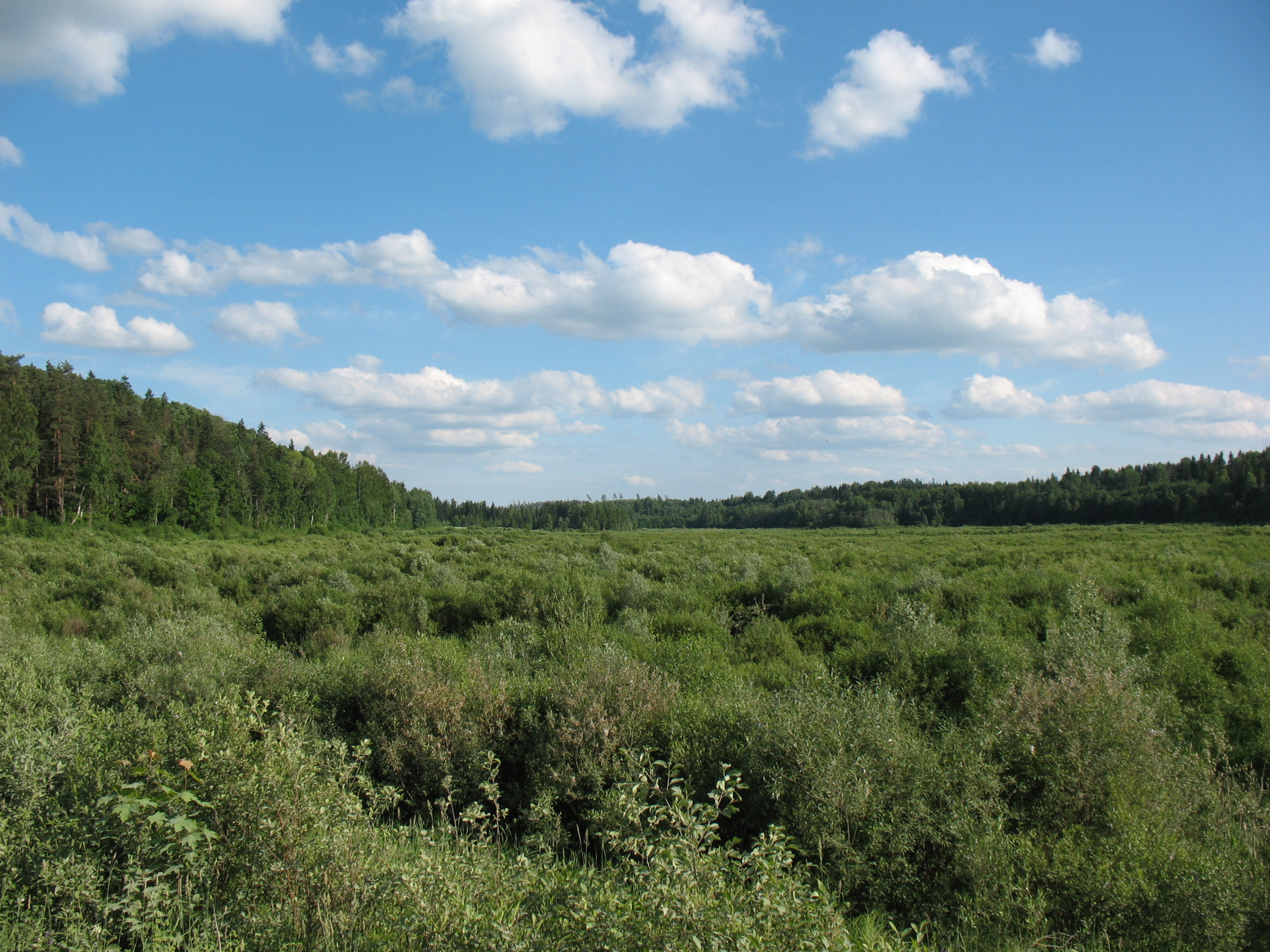 Tartu maakond, Konguta vald,Annikoru küla